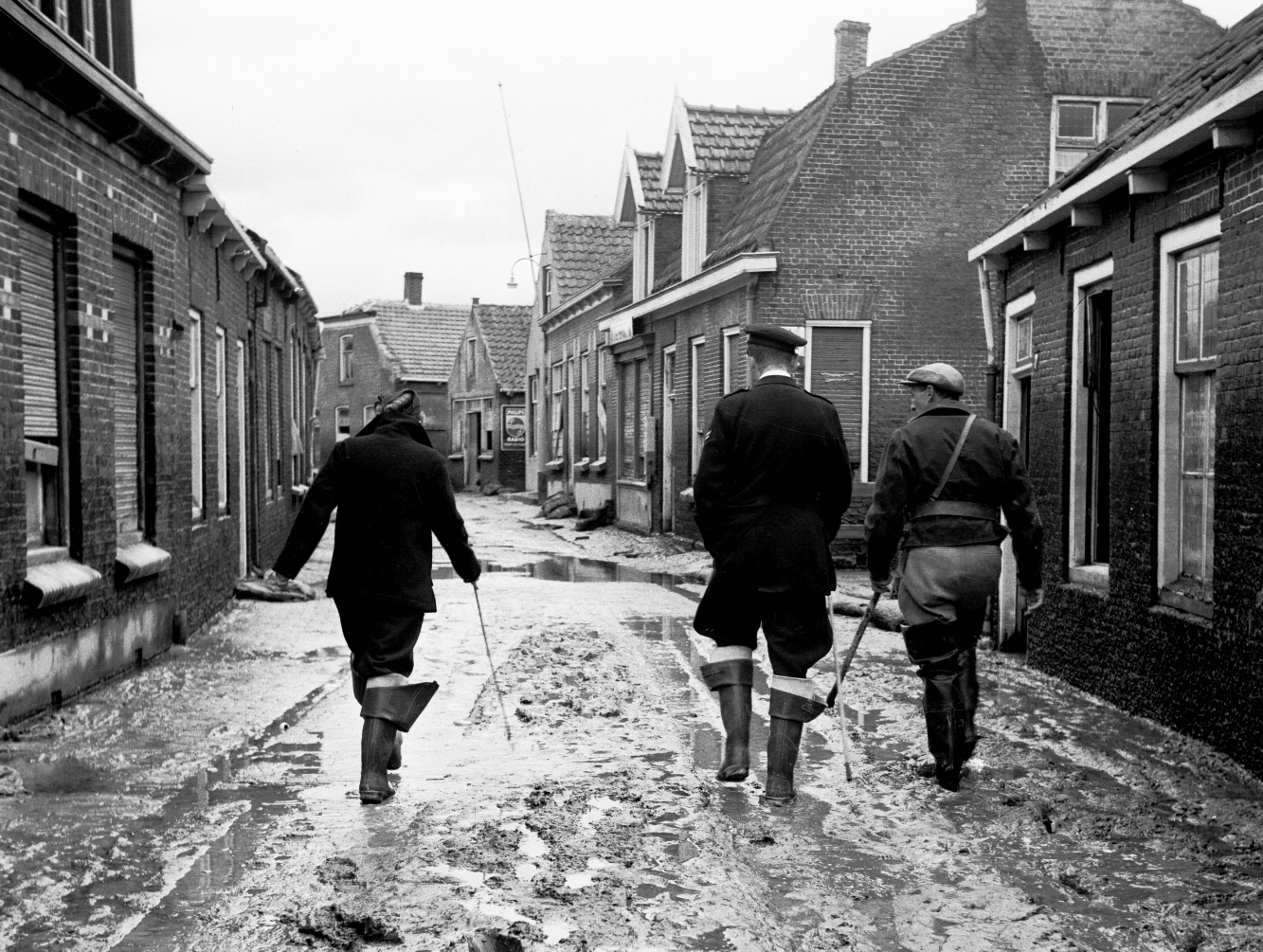 Henny Langeveld in 1953 in Zeeland na de watersnoodramp van 1953.